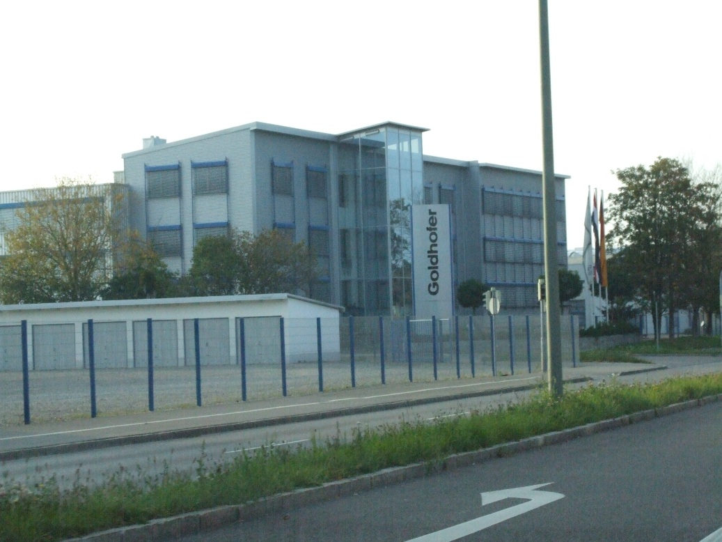 Firma Goldhofer in Memmingen